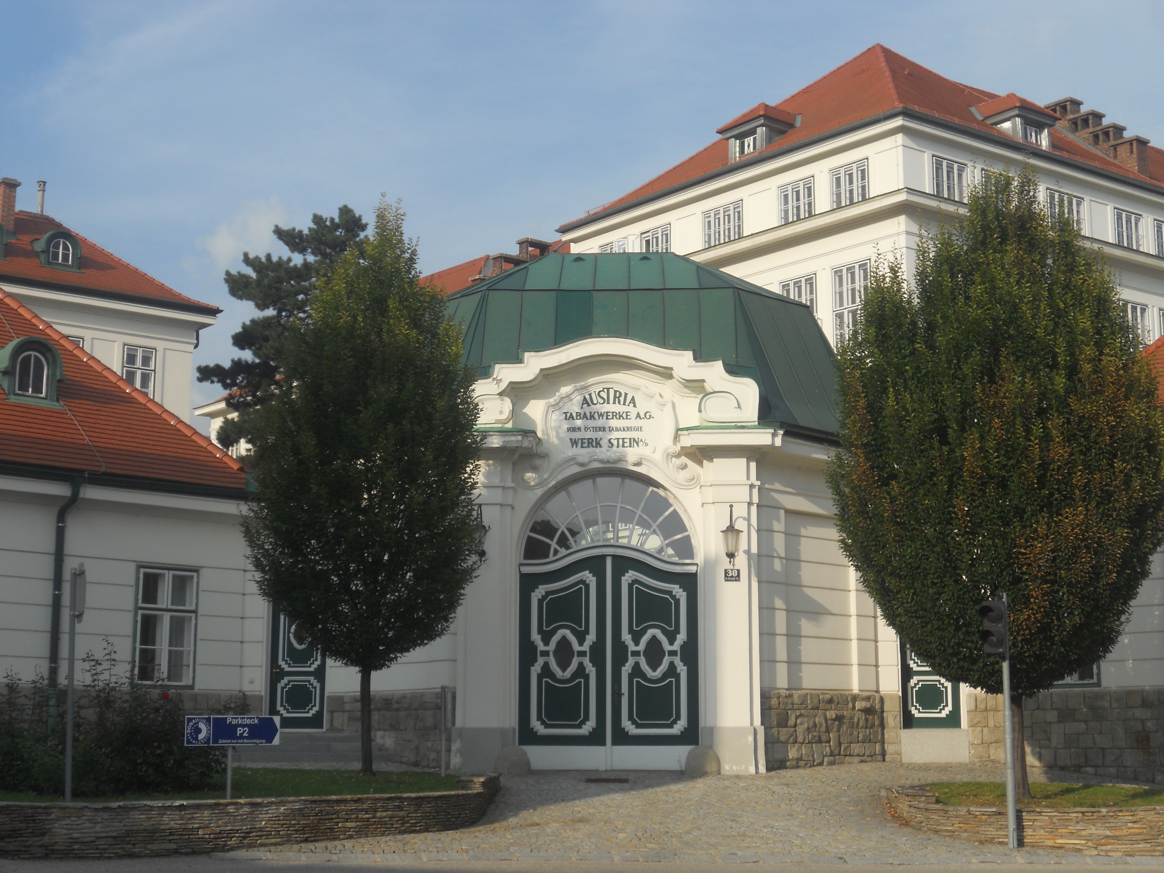 Eingangsportal zur ehem. Tabakfabrik